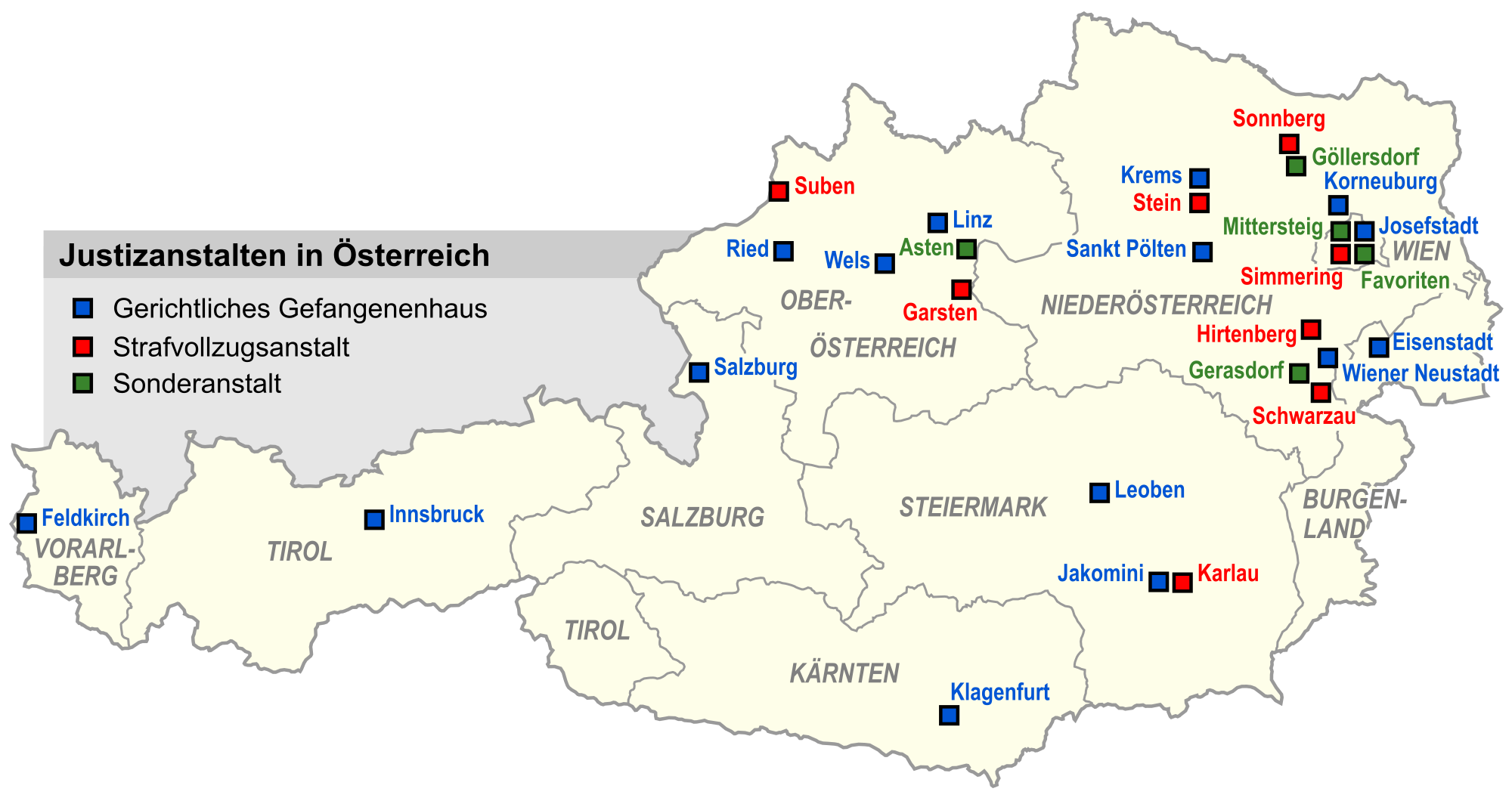 Österreichische Gefängnisse (Justizanstalten)